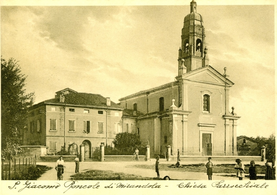 San Giacomo Roncole di Mirandola - Chiesa Parrocchiale